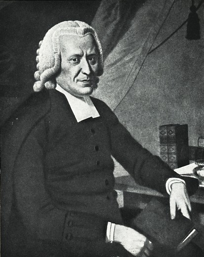 Prediger und Dichter Johann Adolf Schlegel, Vater von August Wilhelm und Friedrich Schlegel.